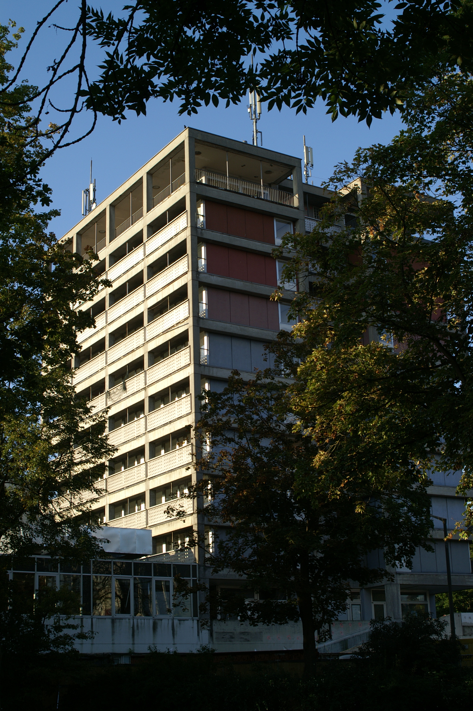 Gebäudekomplex in Regensburg, erbaut von Werner Wirsing, gesprengt am 23. Februar 2020